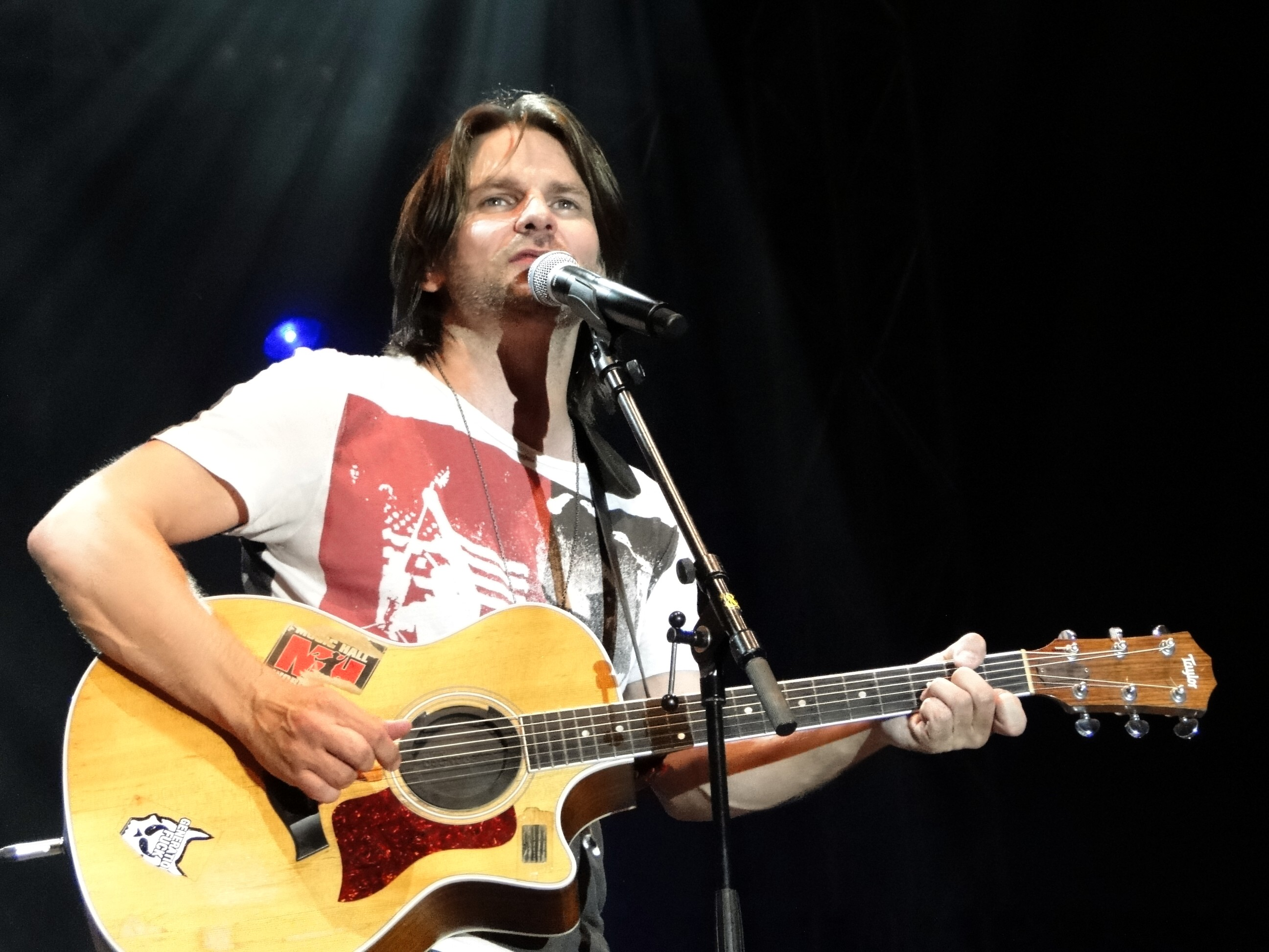 Ray Wilson, Sänger von Stiltskin und früherer Sänger der Band Genesis, bei einem Solokonzert im August 2010